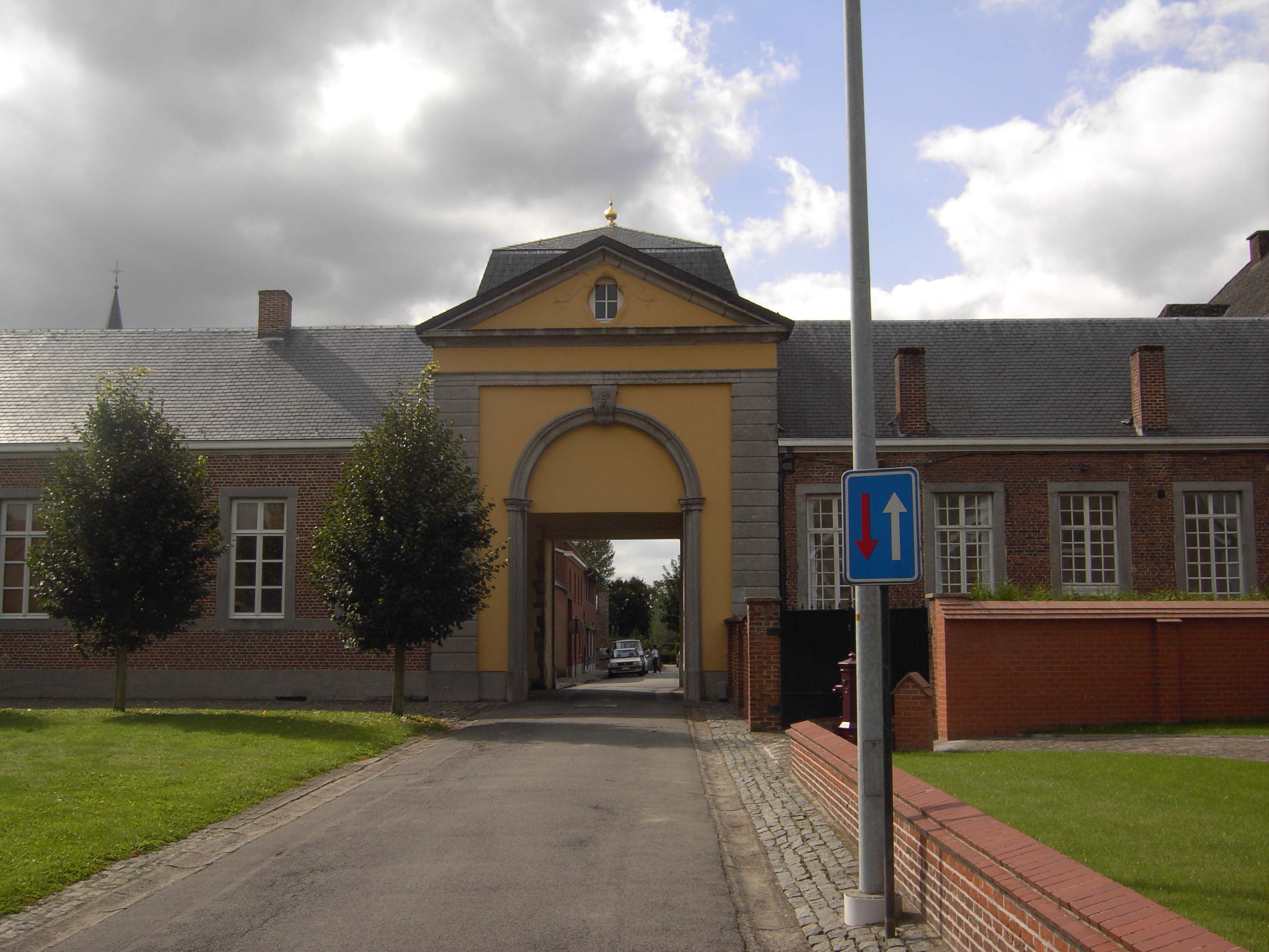 Sint-Martens-Lierde - toegang tot het dorp via een poort - vroeger een Kartuizerpriorij - Lierde - Oost-Vlaanderen - België